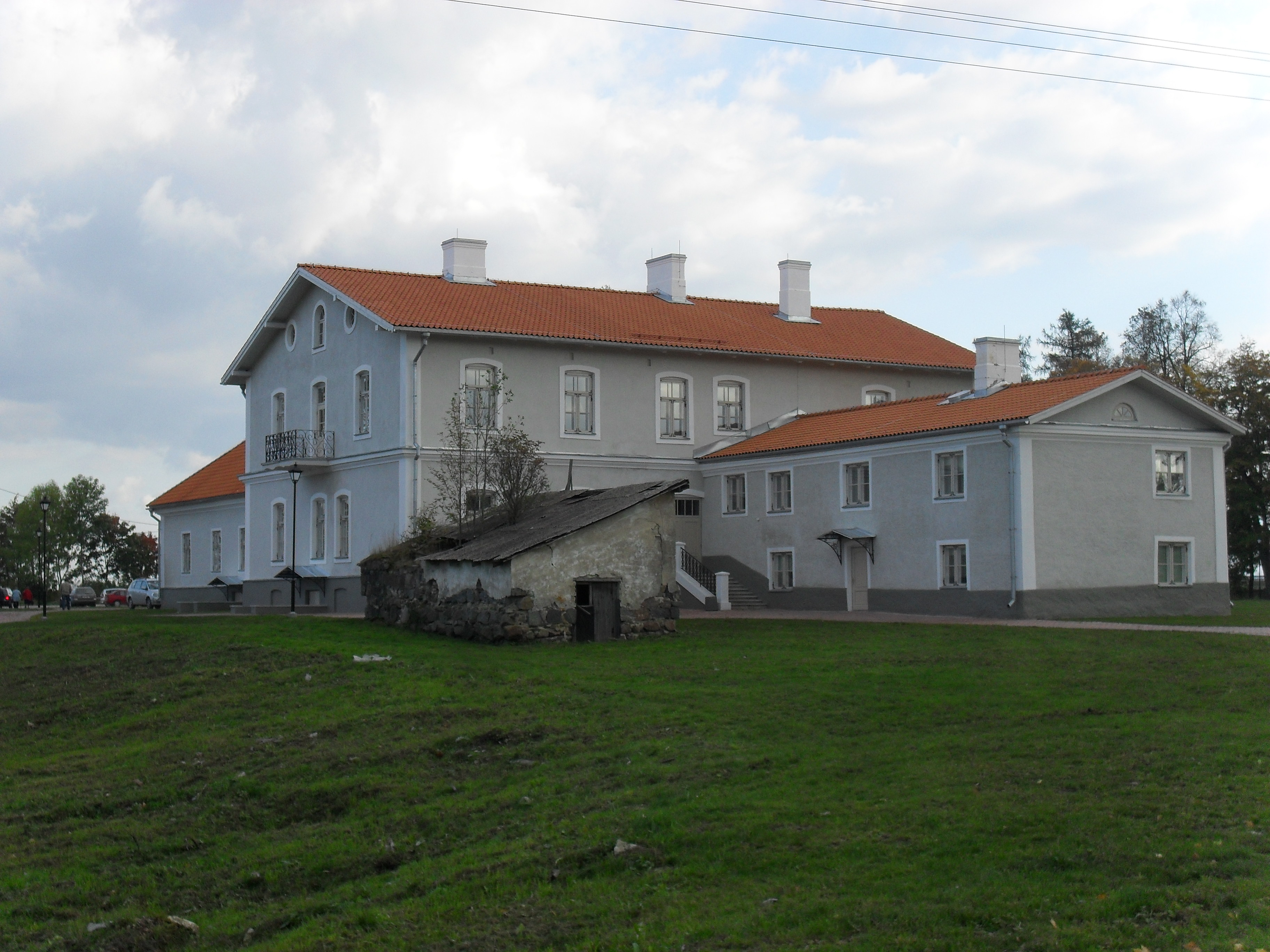 Kukruse mõisa peahoone, 18.-19. sajand